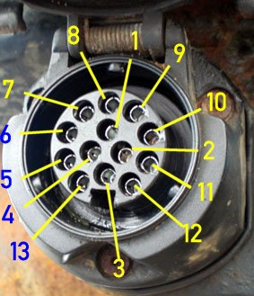 13-poliger Anhängerstecker nach ISO 11446 mit Nummerierung der Anschlussbuchsen